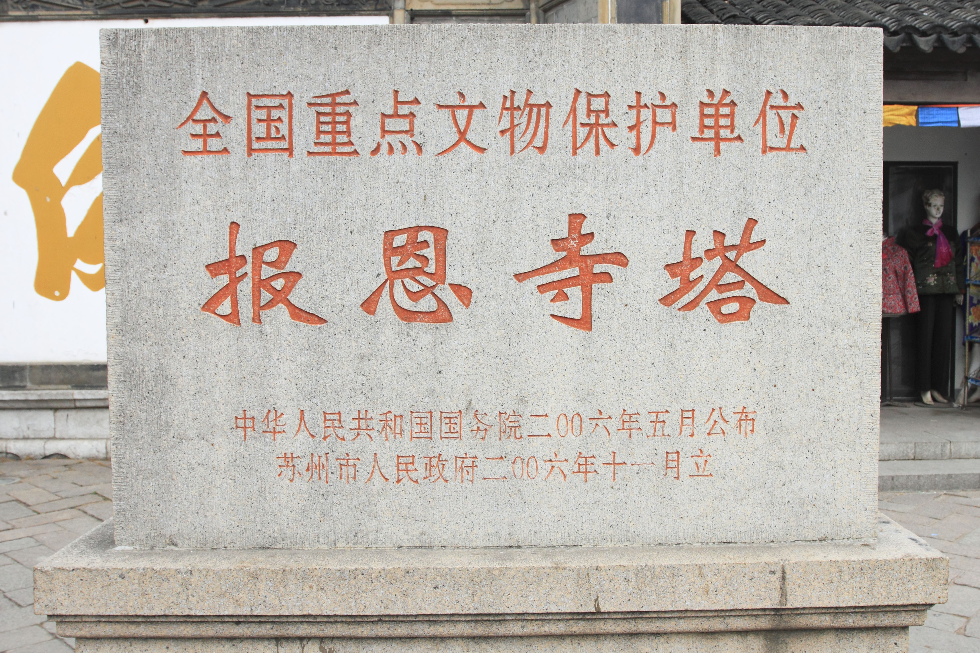 苏州报恩寺塔，全国重点文物保护单位